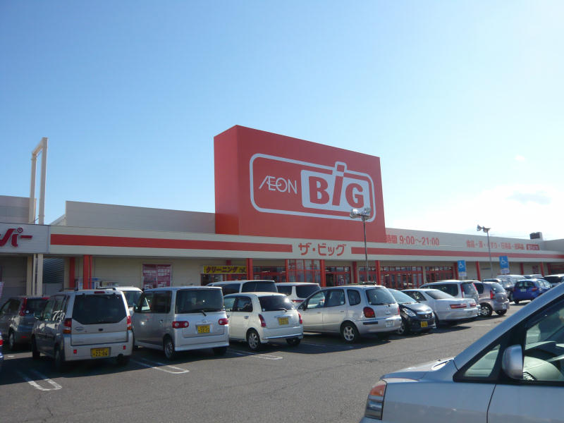 イオンタウン輪之内